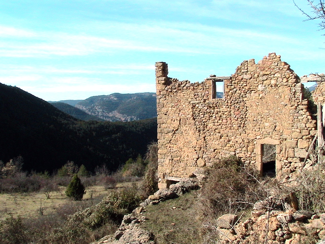 Les runes de la masia de Trasserra, als Llengots